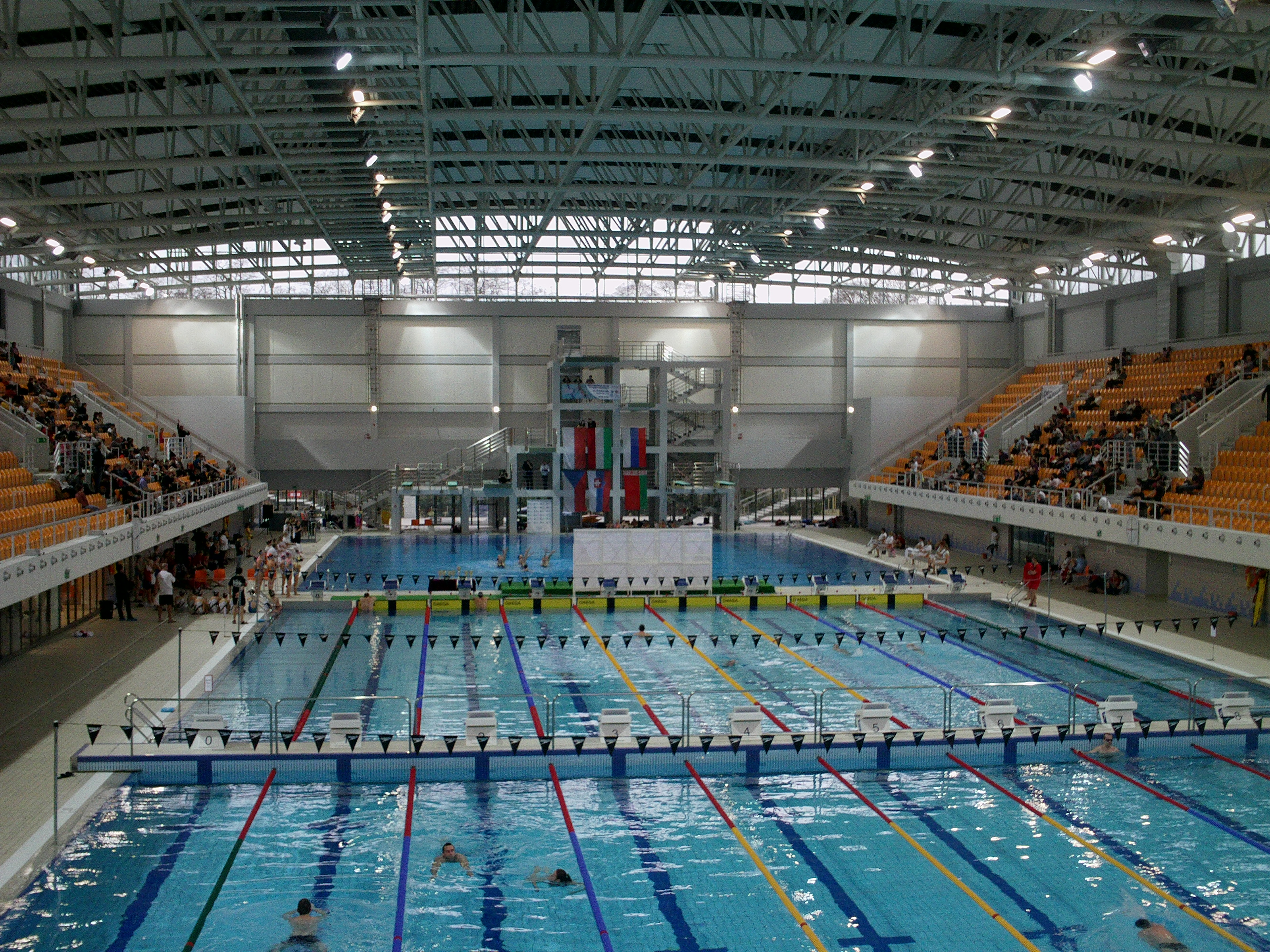 basen sportowy, Poznań.